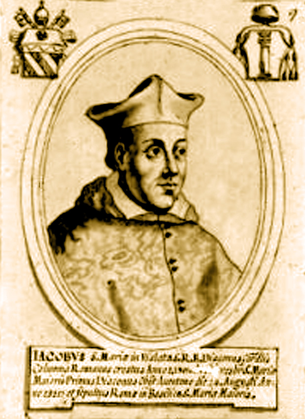 Cardinal Jacopo Colonna, mort à Avignon le 14 août 1318